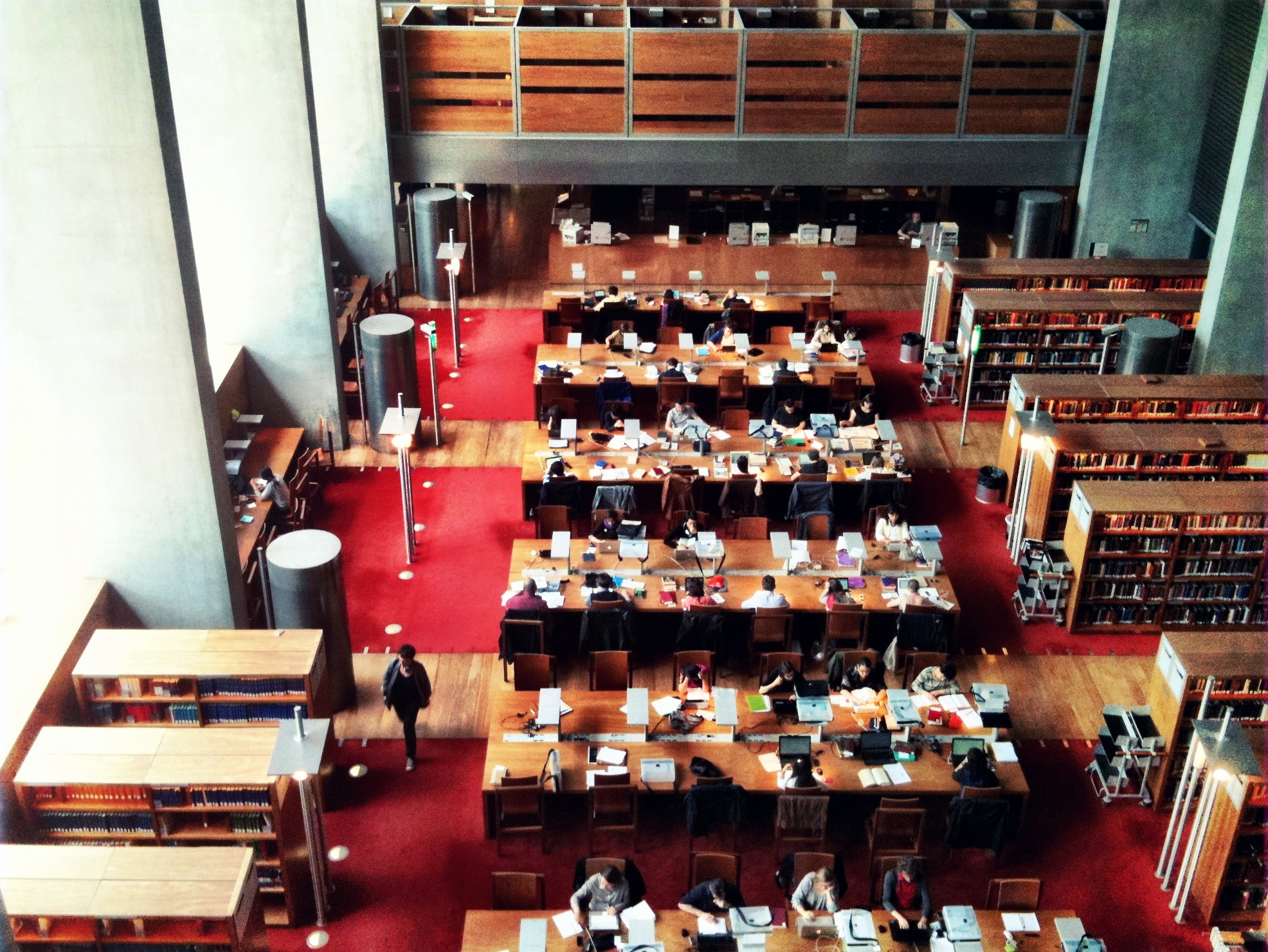 Bibliothèque nationale de France Site Tolbiac.